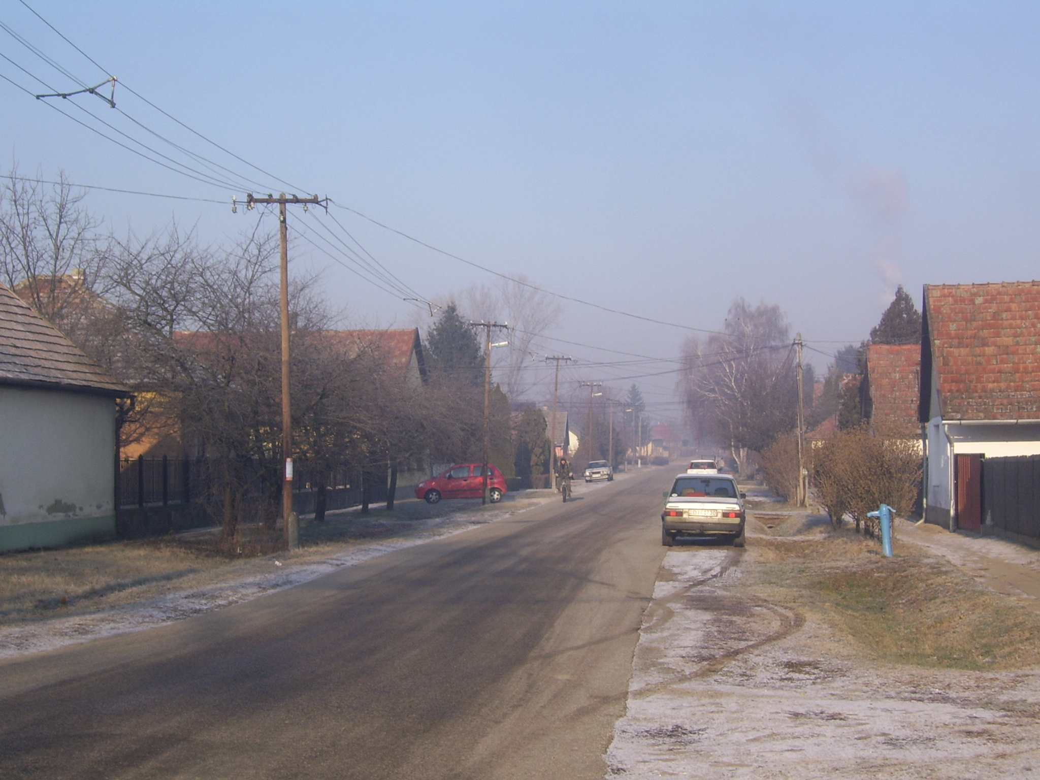 Örkény; Arany János utca